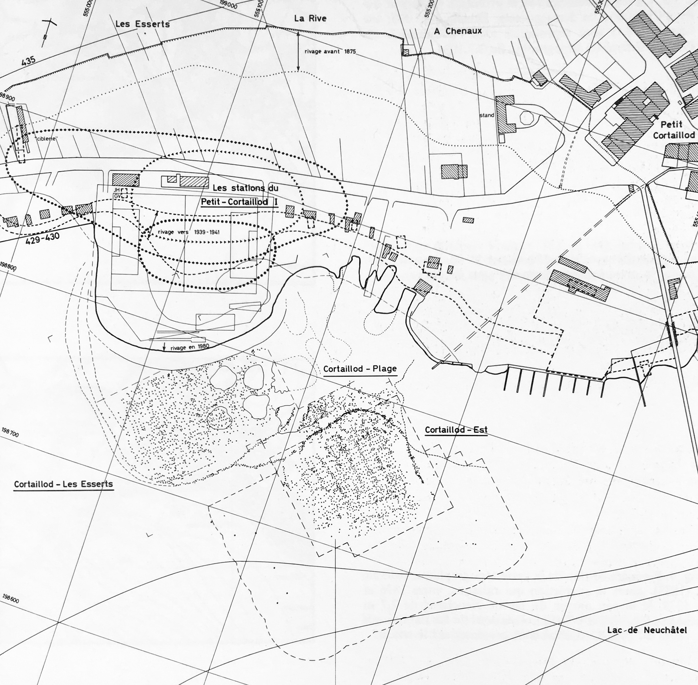 Répartition des sites archéologiques de la Baie de Cortaillod. Tiré de ARNOLD B. 1986 : Cortaillod-Est, un village du Bronze final 1, fouille subaquatique et photographie aérienne Ed. du Ruau, Saint-Blaise. p. 13